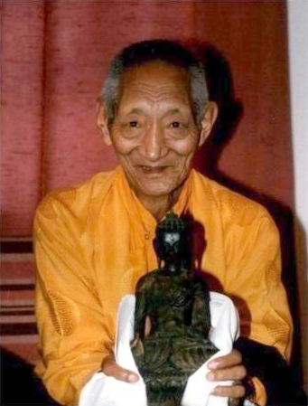 Kalou Rimpotche lors de sa venue à Montpellier en 1987